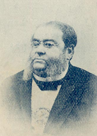 Juan Lindolfo Cuestas (1837 - 1905), político uruguayo, presidente de ese país entre 1897 y 1903.